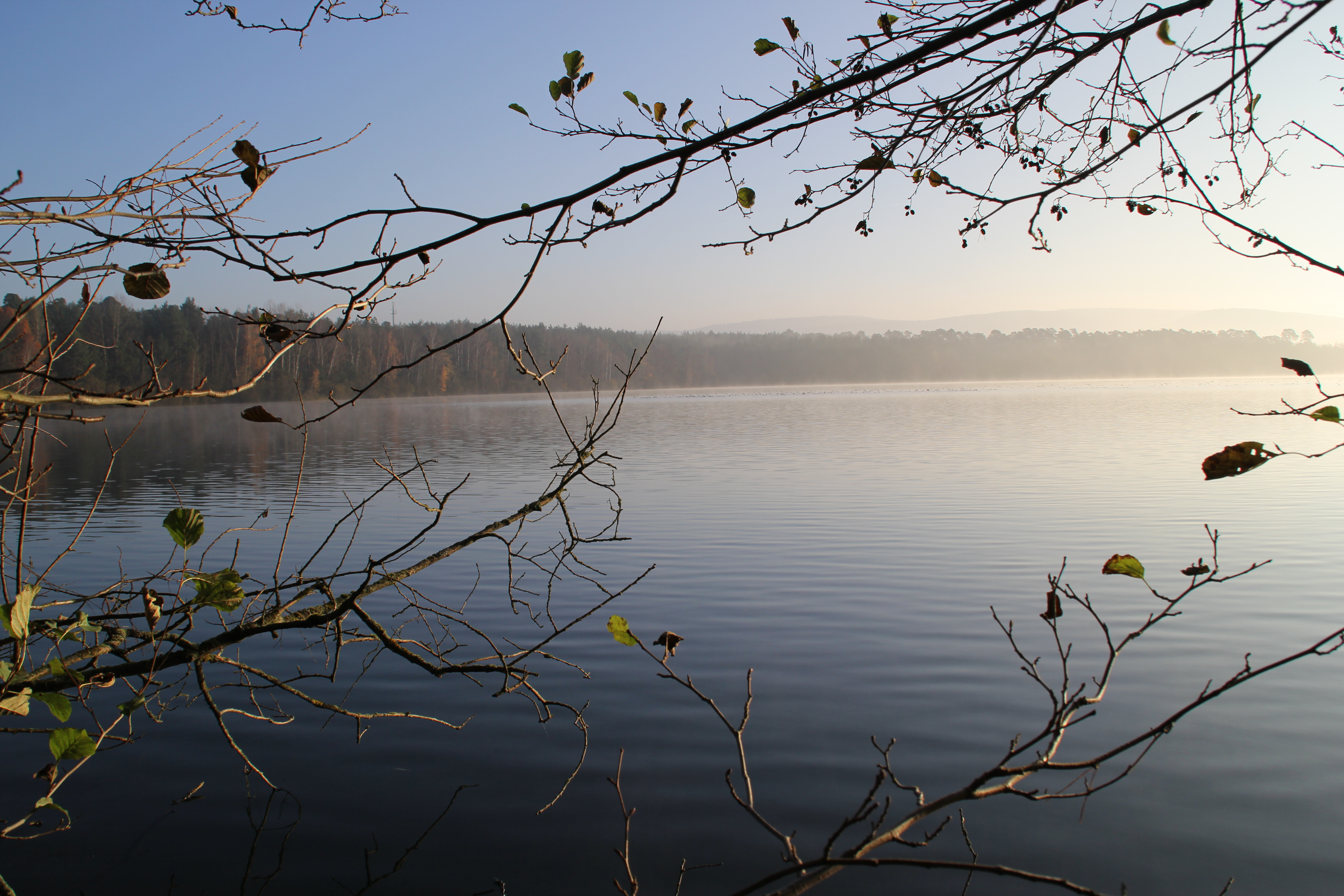 Der Hörsteiner See